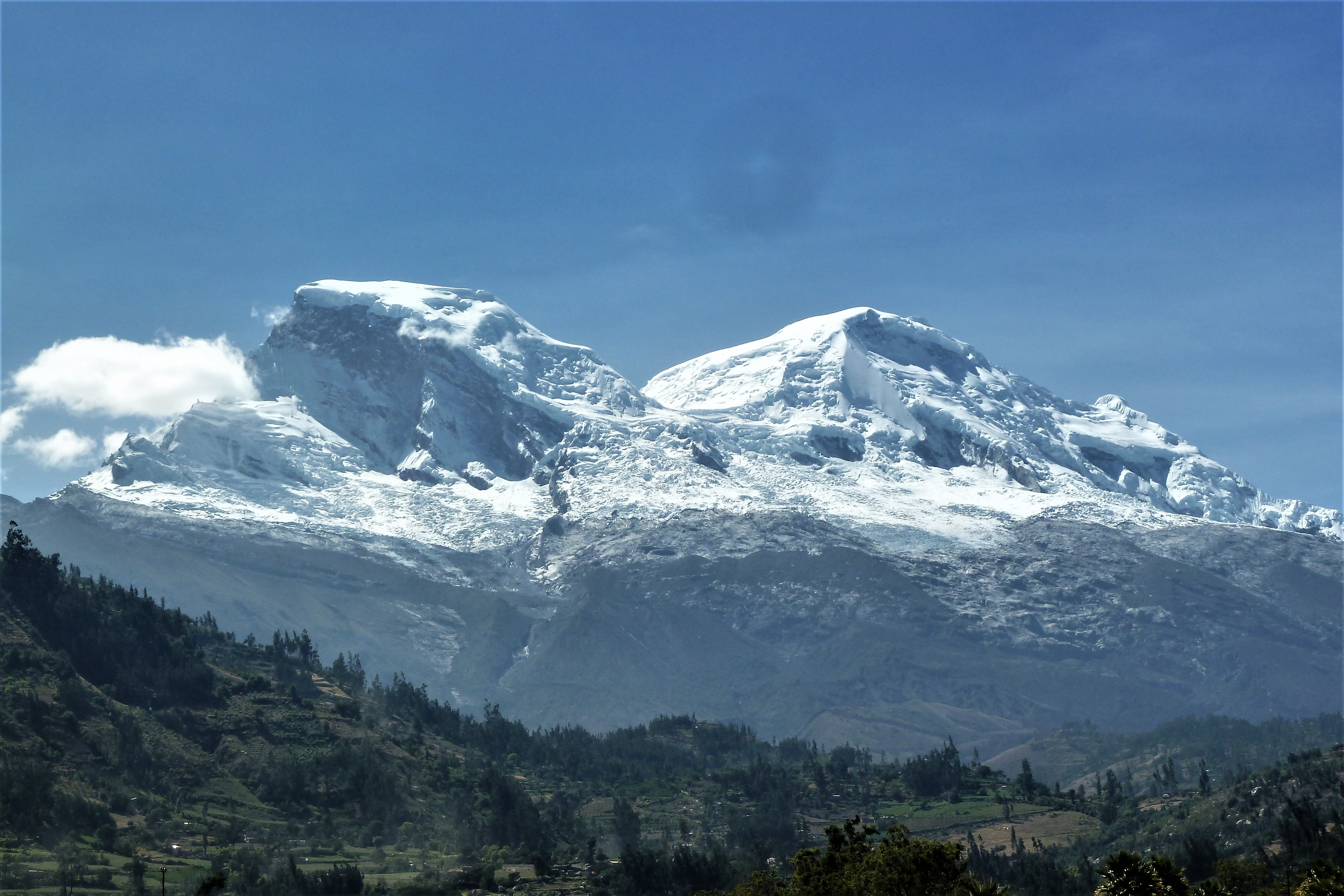 Nevado Huascarán von Westen